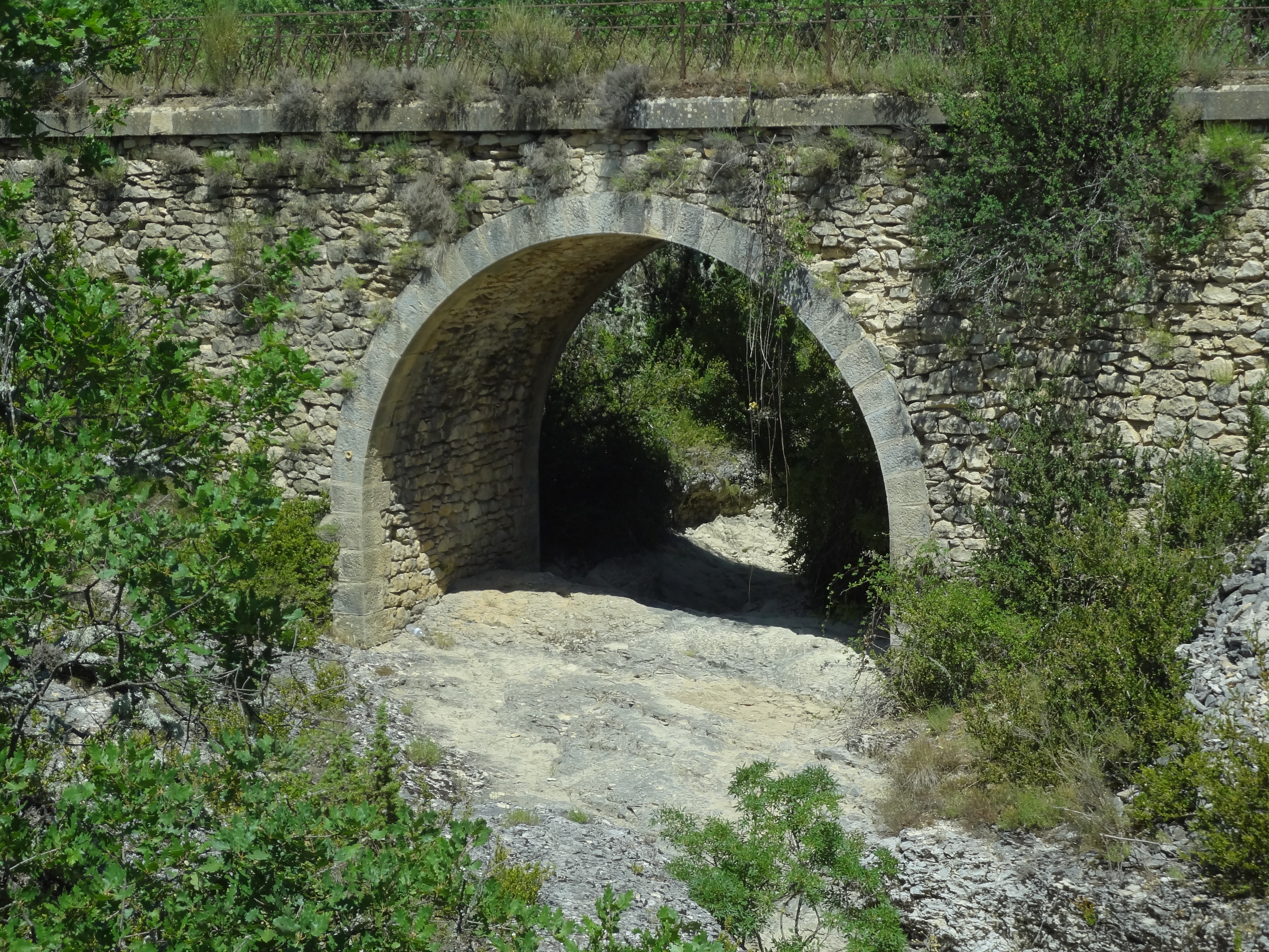 Pont sur le Largue, amont du hameau de Largue